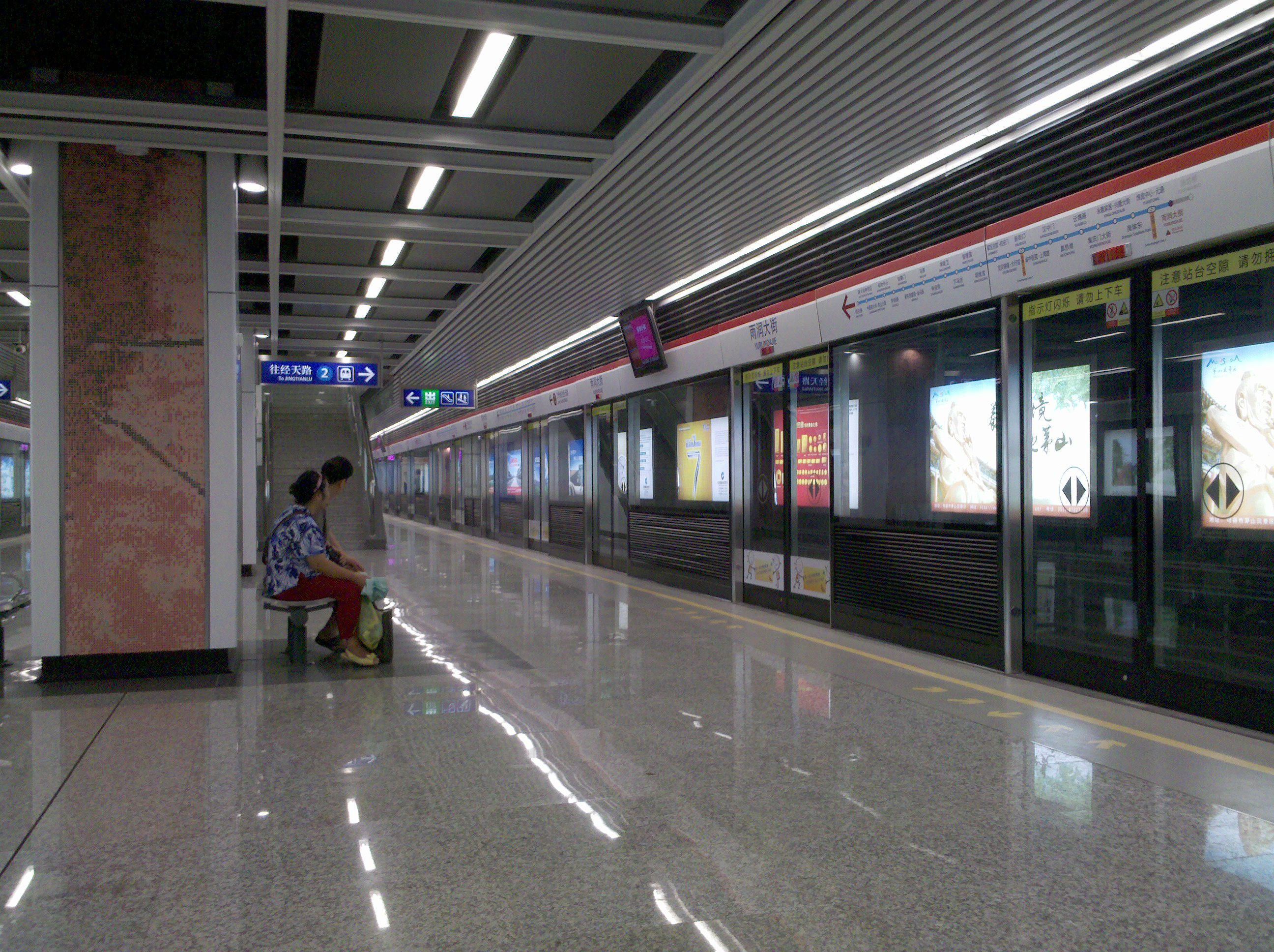 南京地铁二号线雨润大街